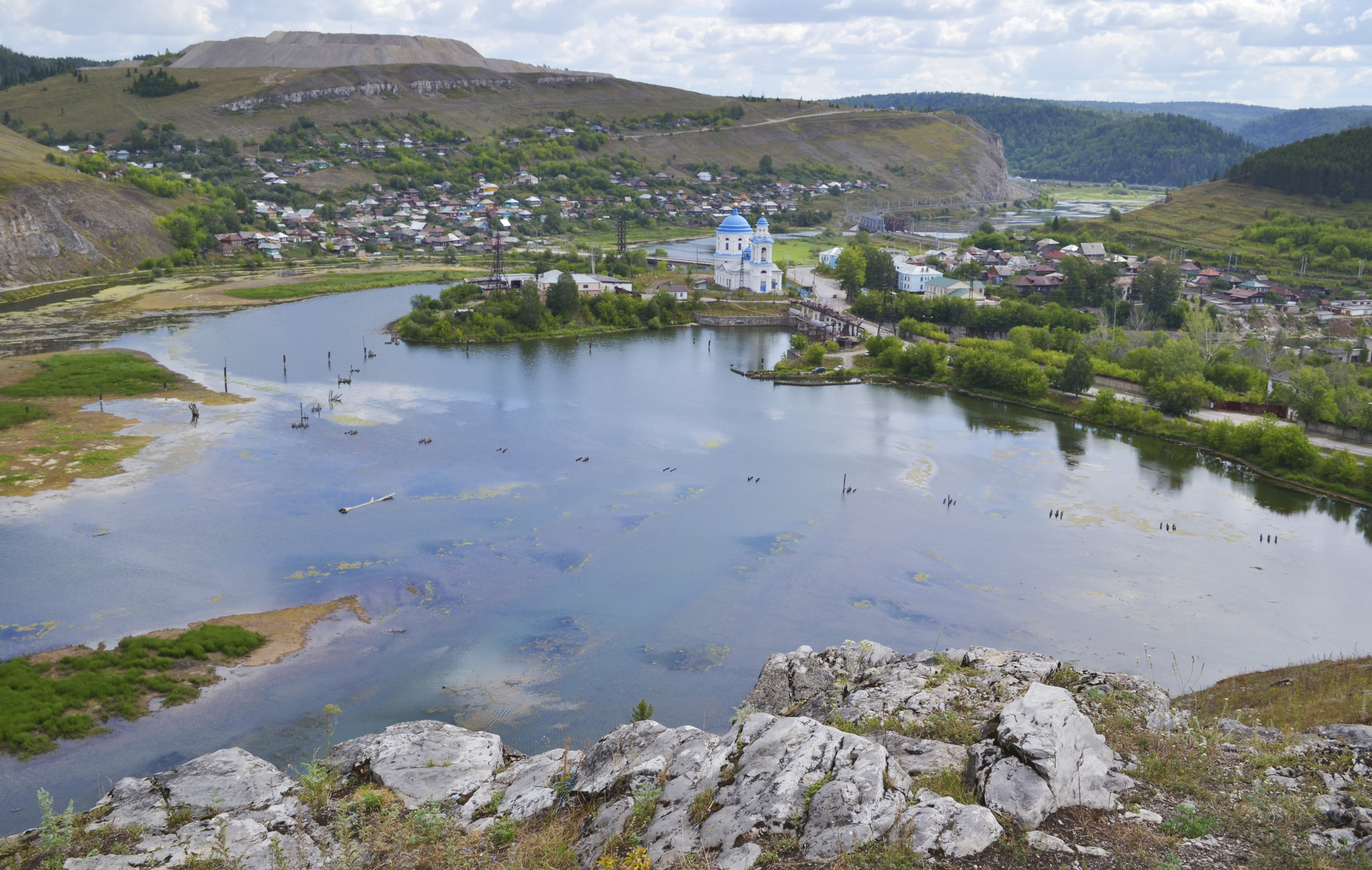 Миньярский пруд, Ашинский район This image is related to the protected area of Russia number 7410033